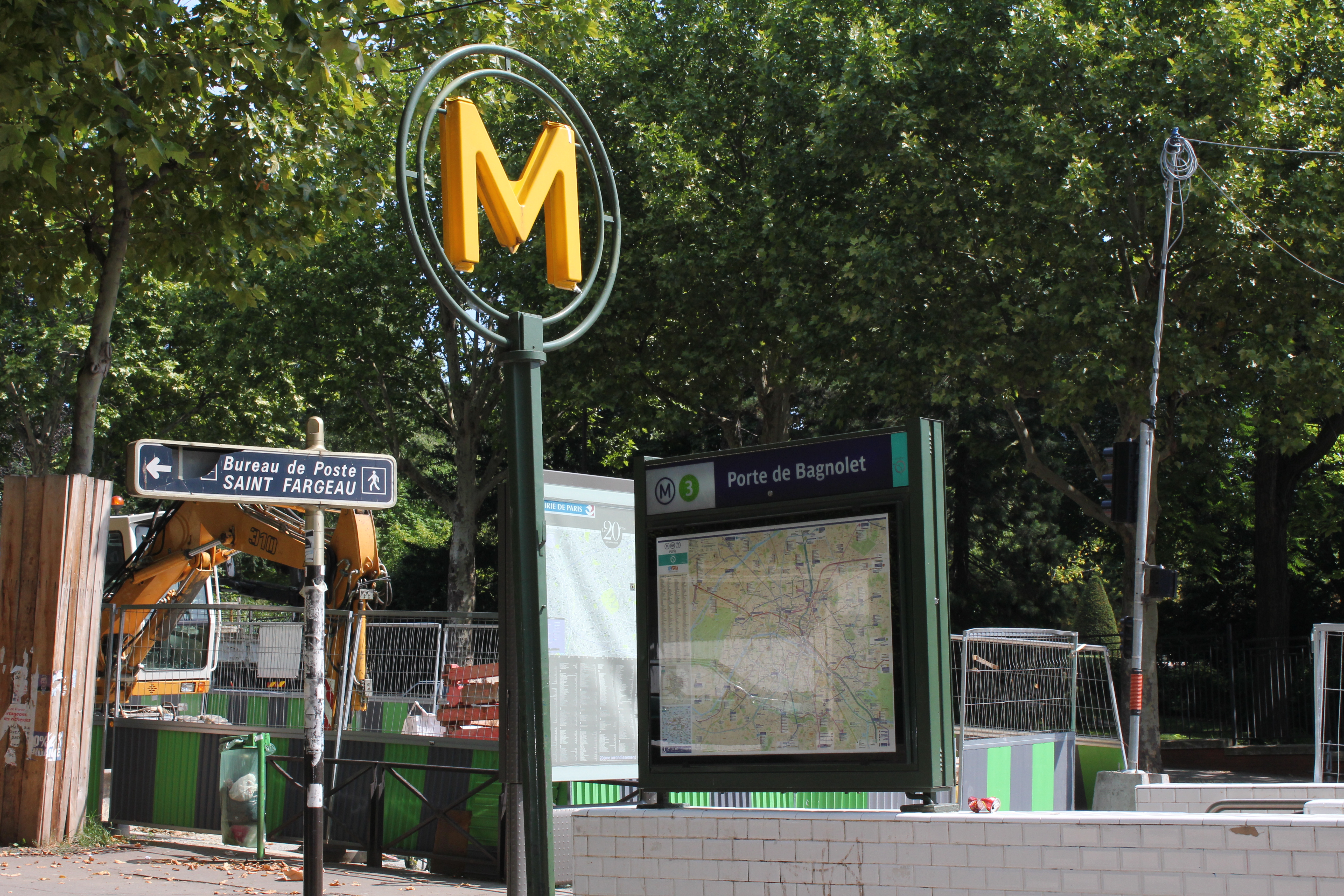 Entrée de la station Porte de Bagnolet de la ligne 3 du métro de Paris, France